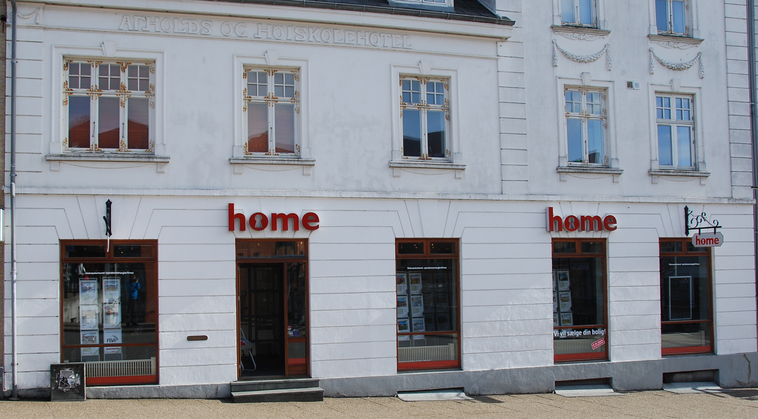 Bygningen placeret på Gravene 20 i Viborg. Opført i 1905-06. Blev indtil slutningen af 1980'erne benyttet som hotel. Den venstre del bliver her (2011) benyttet af en ejendomsmægler fra Home.